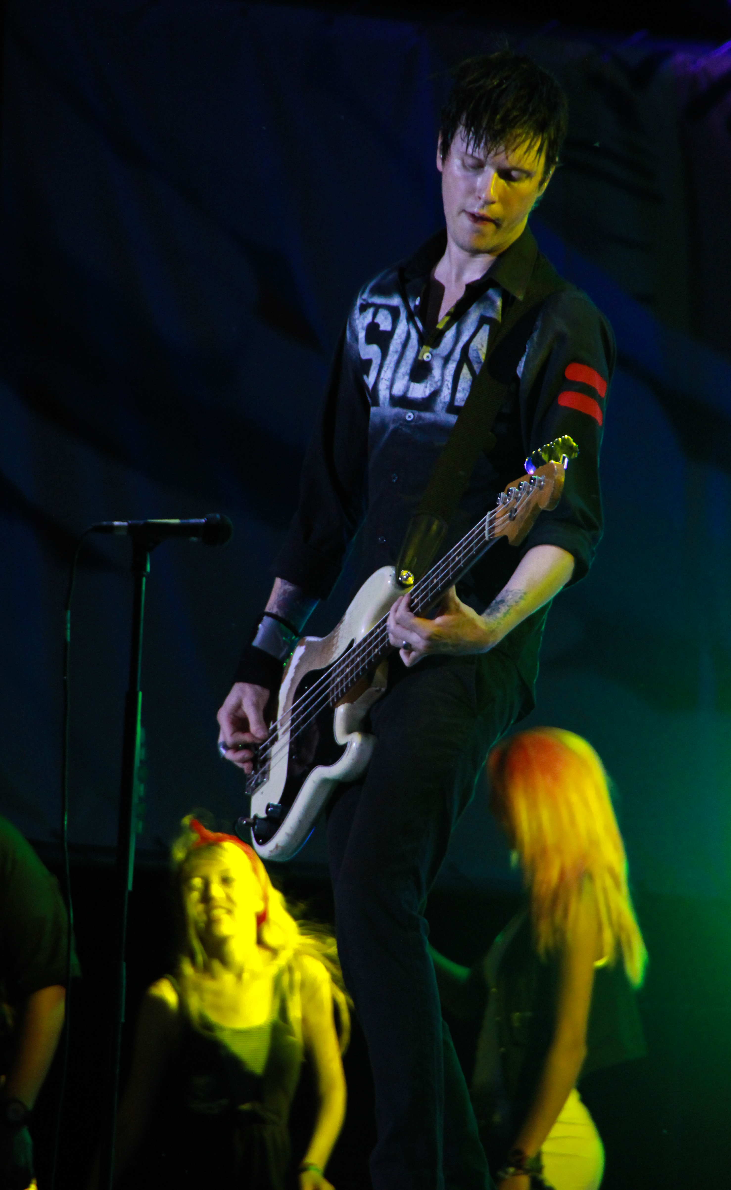 Sum 41 на фестивале Kubana 2012